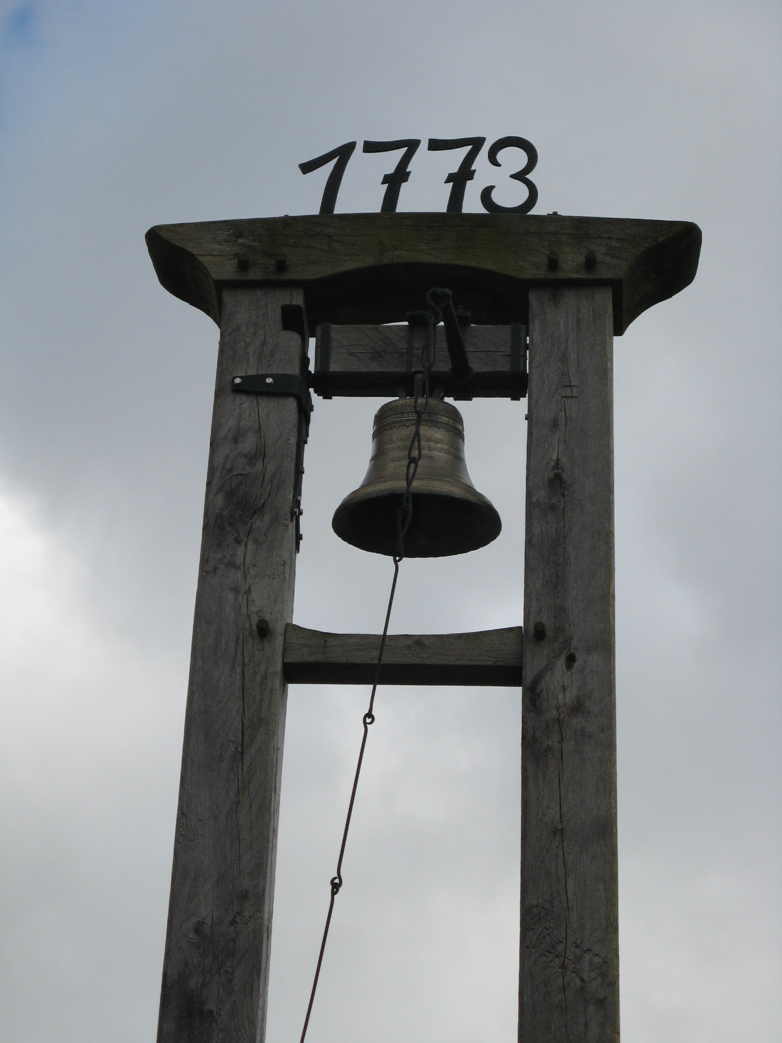 Bauernglocke in Norderstapel Author: Dirk Ingo Franke